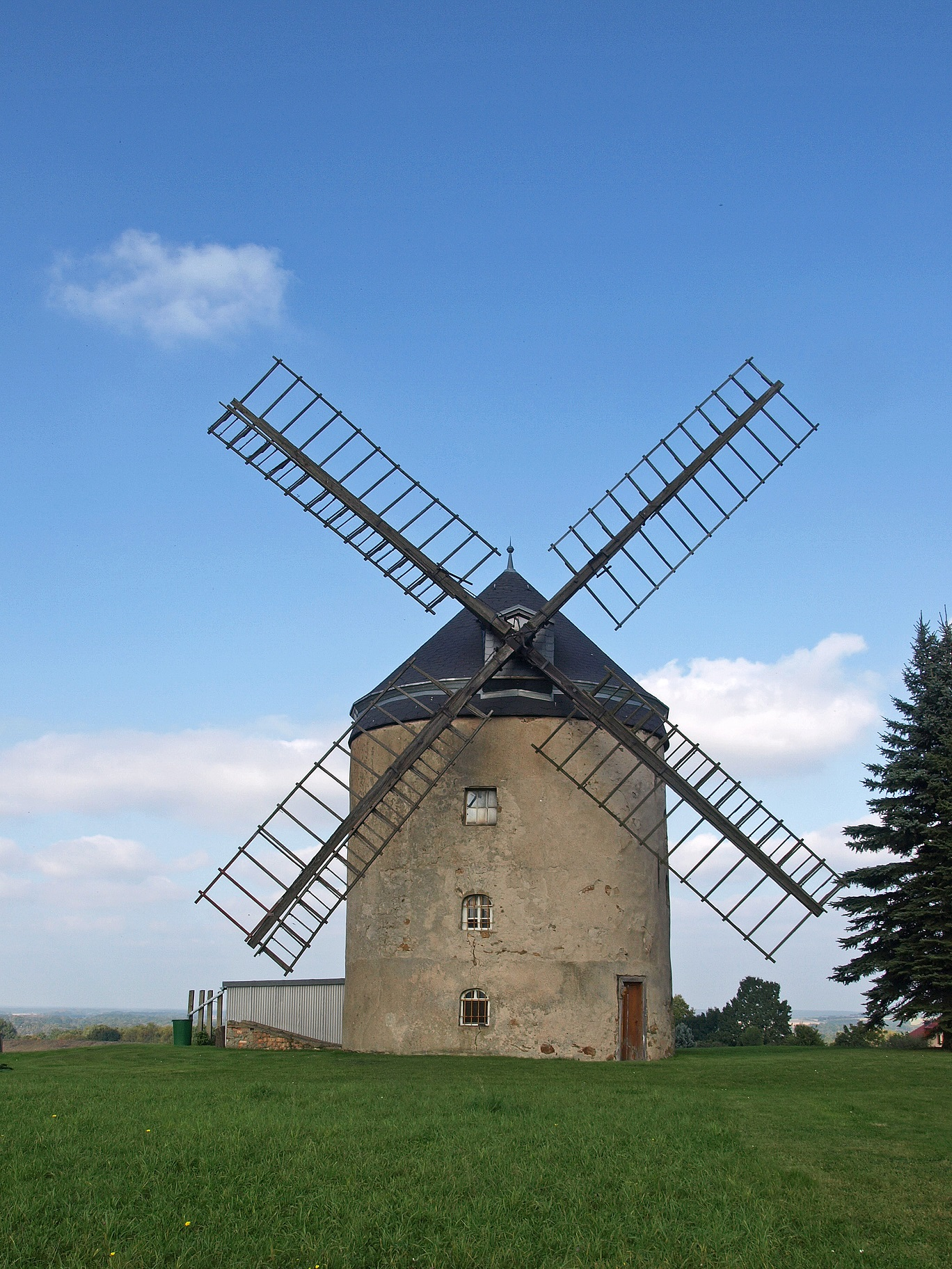 Holländerwindmühle in Rodewitz (Hochkirch)